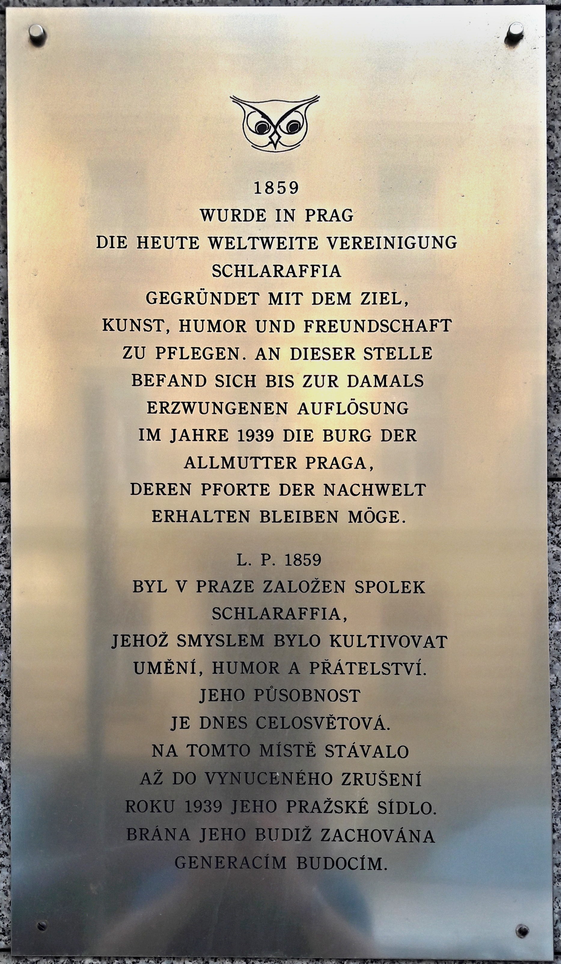 Pamětní deska založení spolku Schlaraffia, Štěpánská 623/40, Praha